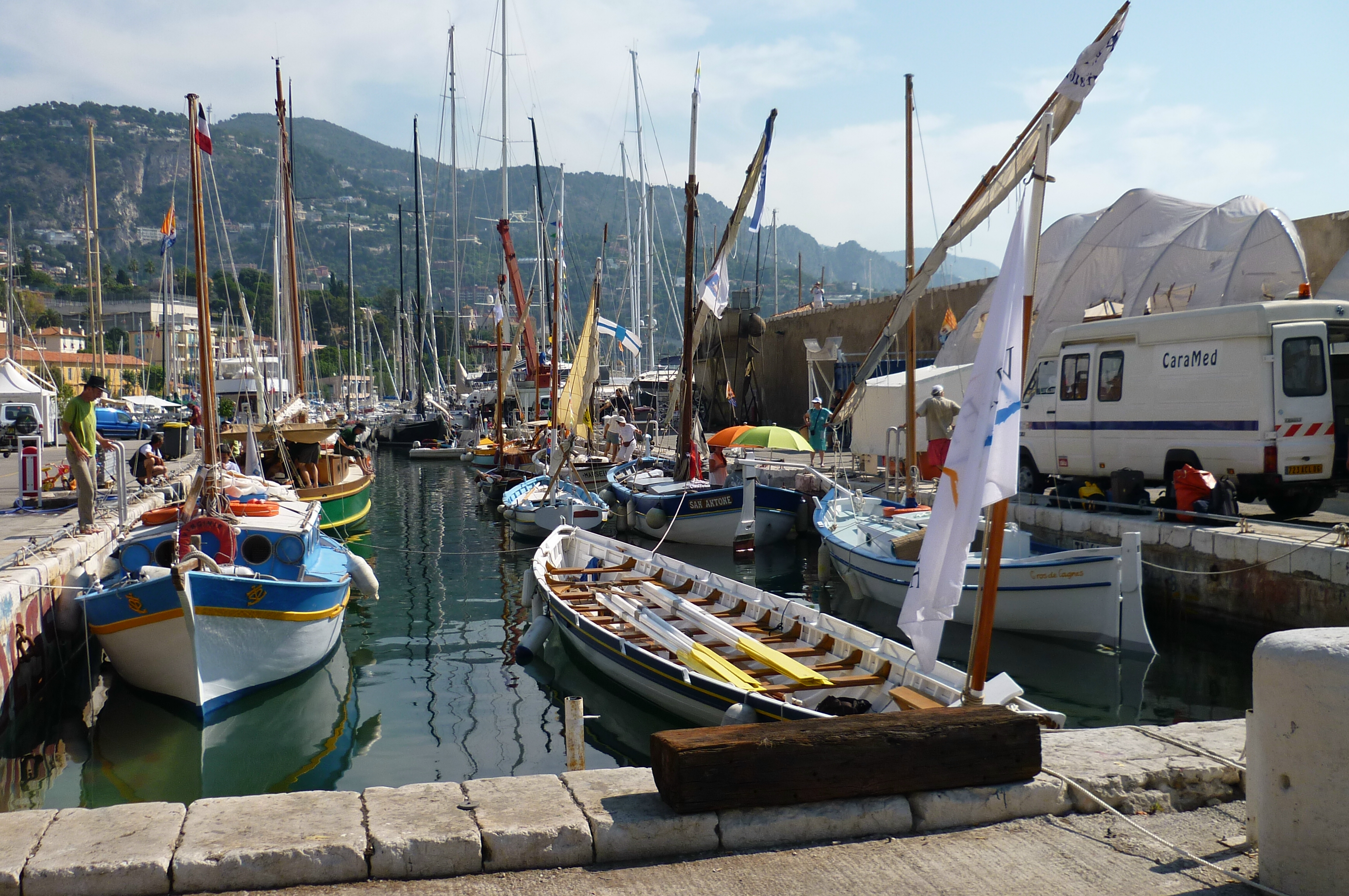 Le bassin de radoub de la Darse de Villefranche-sur-Mer lors du départ de la CaraMed 2010